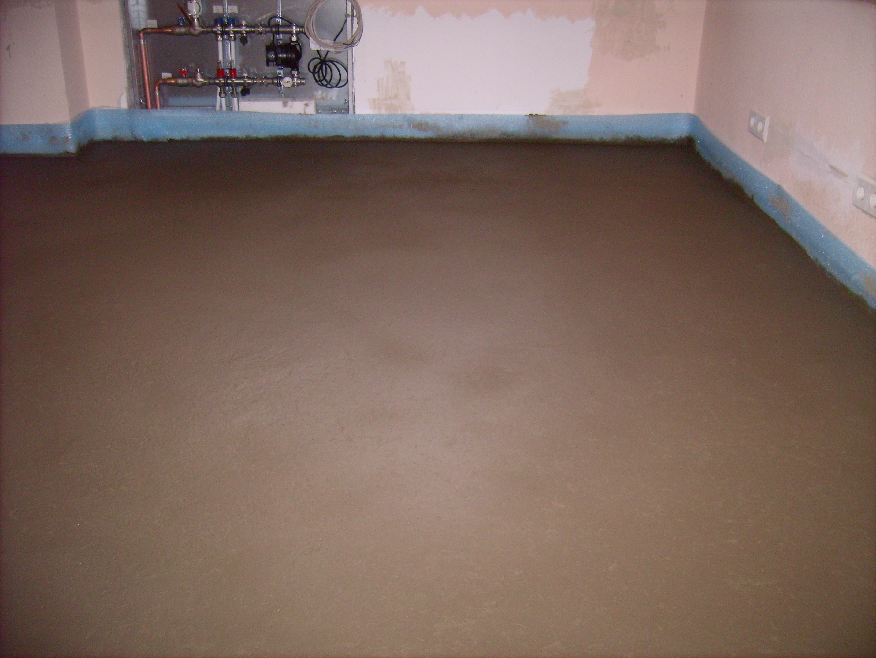 Estrich, fertig geglättet